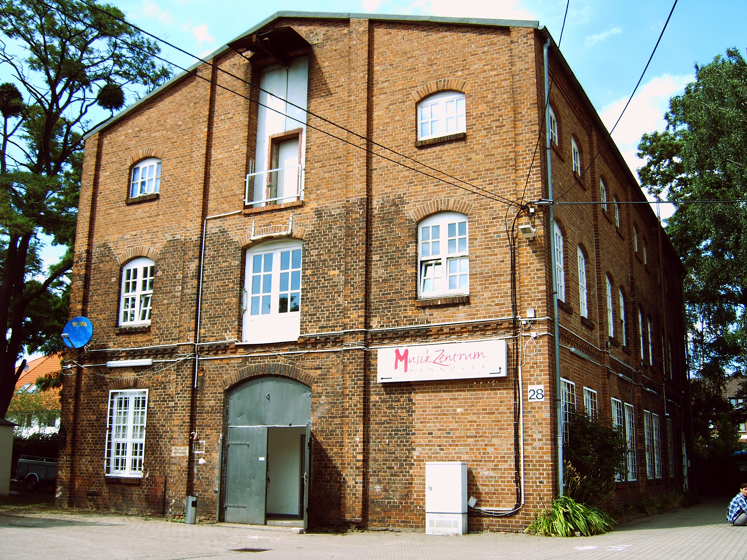 Das alte Klinkergebäude in der Emil-Meyer-Straße 28 diente bis 1991 der Maschinenbau-Firma Knoevenagel als Halle für ihre Modelbauten. Heute ist es Sitz des MusikZentrums Hannover mit der Verwaltung und verschiedenen Studios.